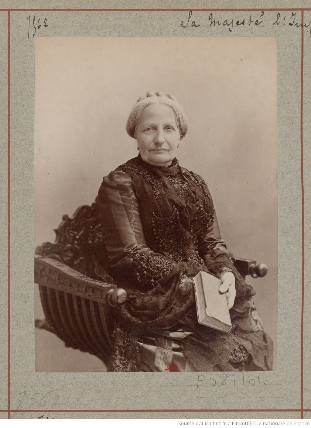 Thérèse-Christine de Siciles (1822-1889).